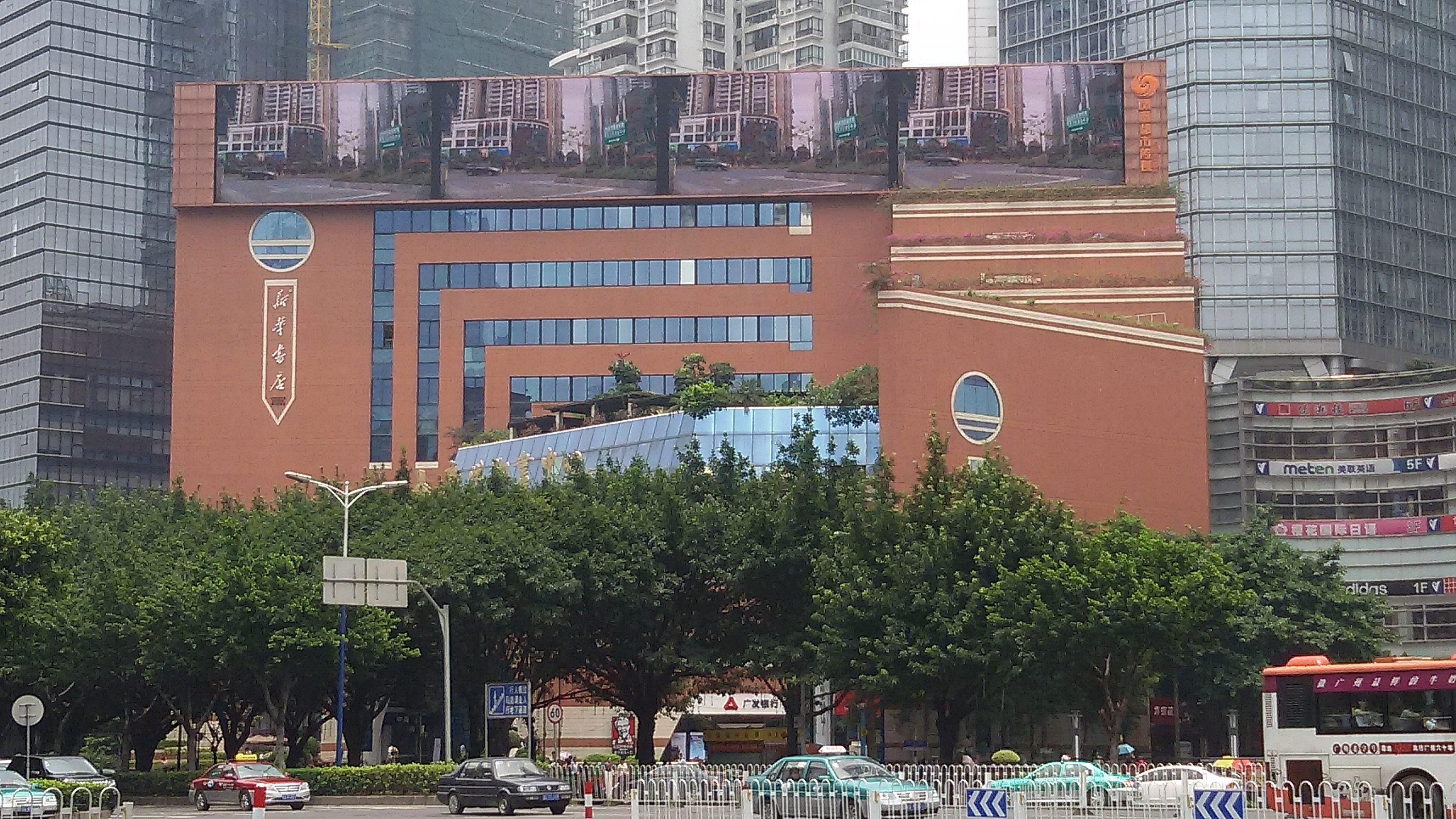 粵語: 廣州購書中心